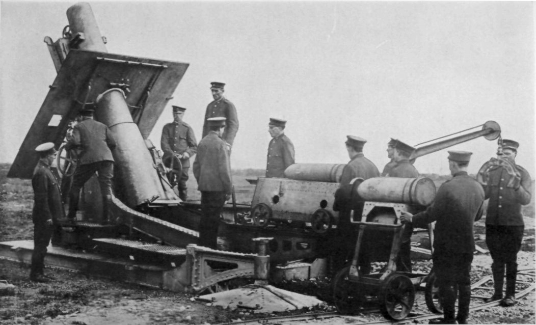 Photograph of French Mortier de 280mm Schneider elevated ready for firing, viewed from left rear. See also : Image:Mortier de 280 Schneider Disassembled For Transport.jpg Image:Mortier de 280 Schneider In Action.jpeg Image:Mortier de 280 Schneider Loading.jpeg Image:Mortier de 280 Schneider Elevated.jpg